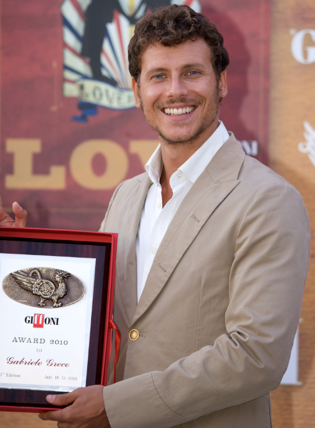 Gabriele Greco al Giffoni Film Festival 2010